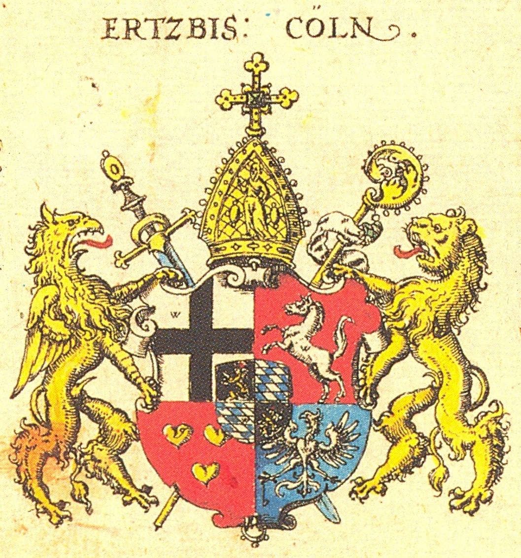 Siebmachers Wappenbuch, Blatt 3, Erzbistum Köln, 1605